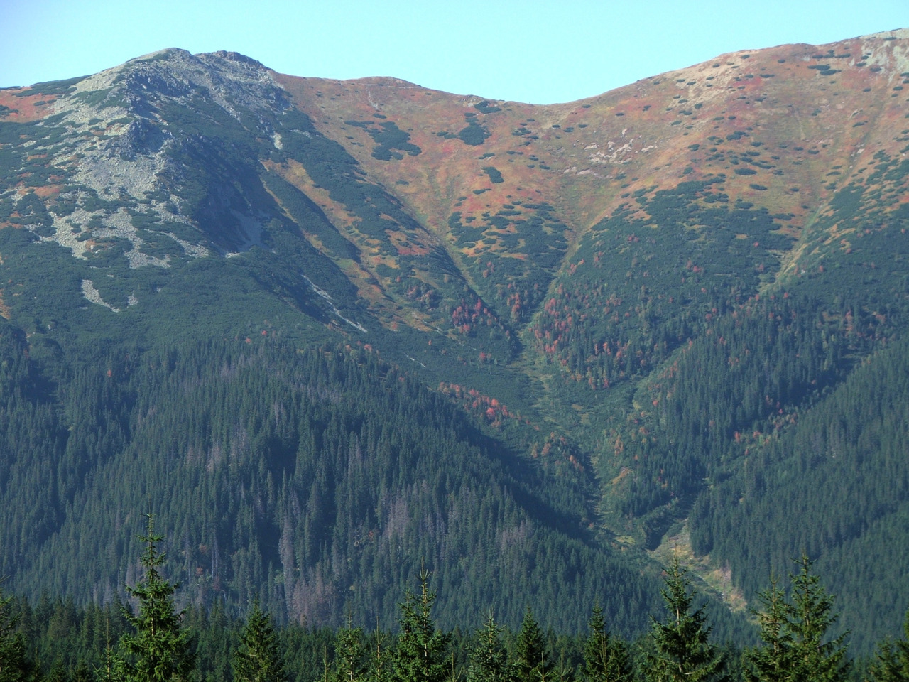 Siwe Skały (Tatra Mountains, Ornak)